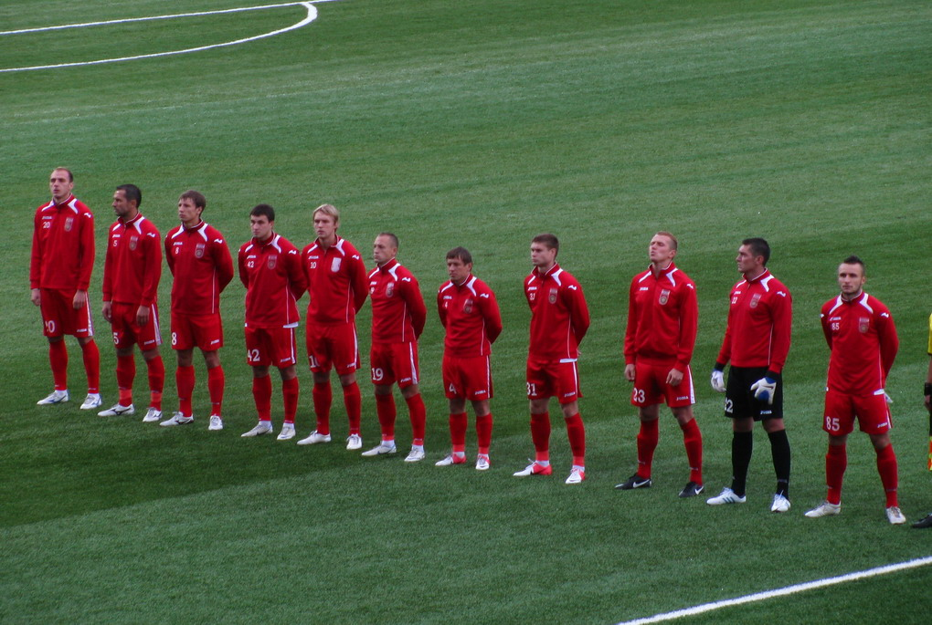 Стартовый состав ФК Уфа в кубковом матче против ФК Урал 02.09.2012 г. Слева направо: Роман Войдель (№20), Андрей Смирнов (№5), Сергей Данилов (№8), Юрий Кириллов (№42), Виталий Галыш (№10), Антон Киреев (№19), Сергей Осадчук (№4), Максим Тишкин (№31), Сергей Путилин (№23), Дмитрий Изотов (№22), Михаил Попов (№85)